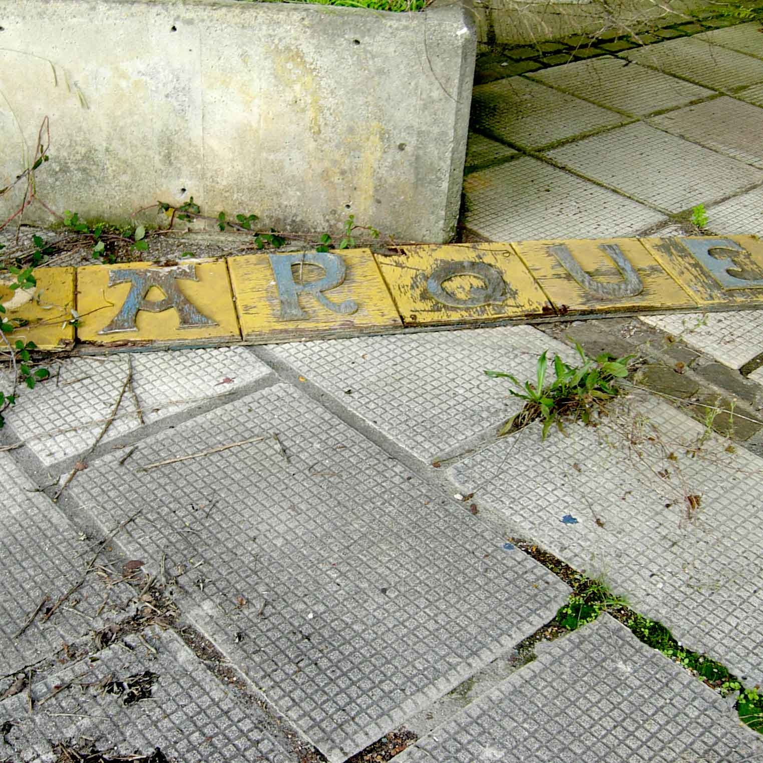 Rótulo Cartel Parque de Atracciones de Vizcaya